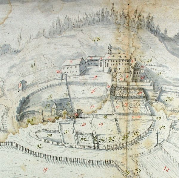 Kloster Gorheim, Ansicht um 1769 Plan der Klosteranlage mit umliegenden Besitzungen (Signatur: Staatsarchiv Sigmaringen FAS DS 1 T 1-5 R 75,308)